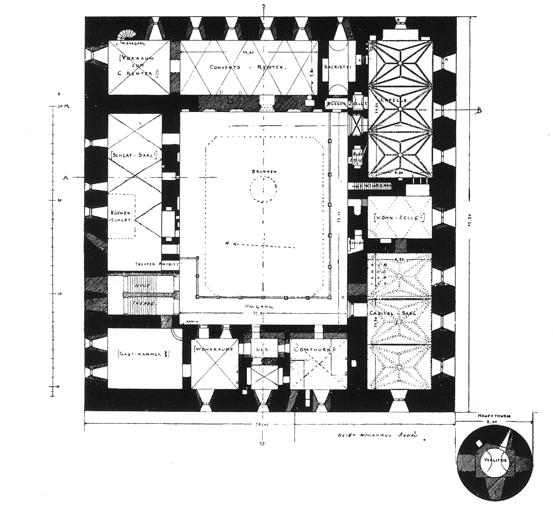 Gollub, Grundriss